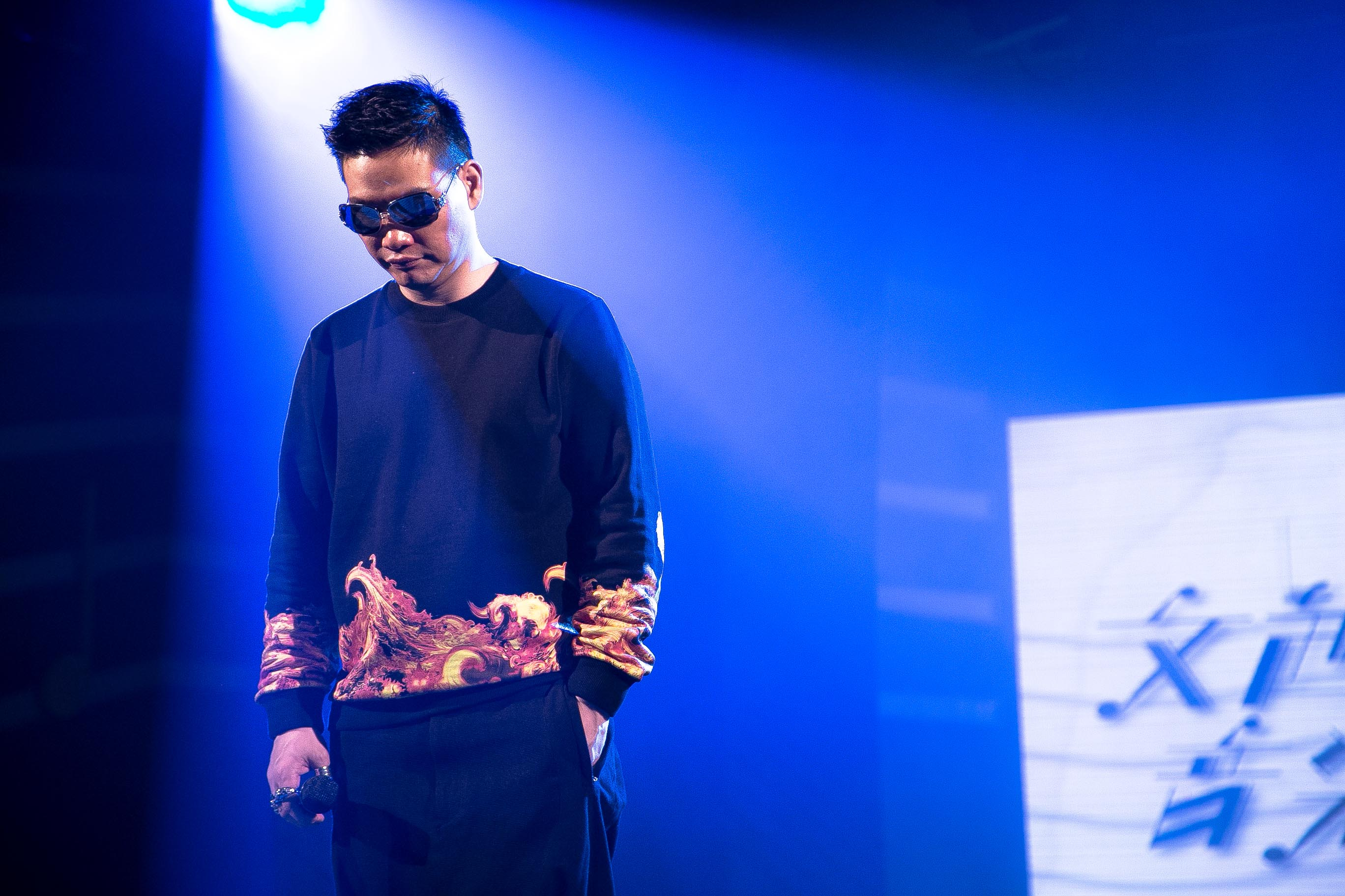 歌手蘇永康參加臺灣電視公司純音樂綜藝節目《文茜的音樂故事》錄影。